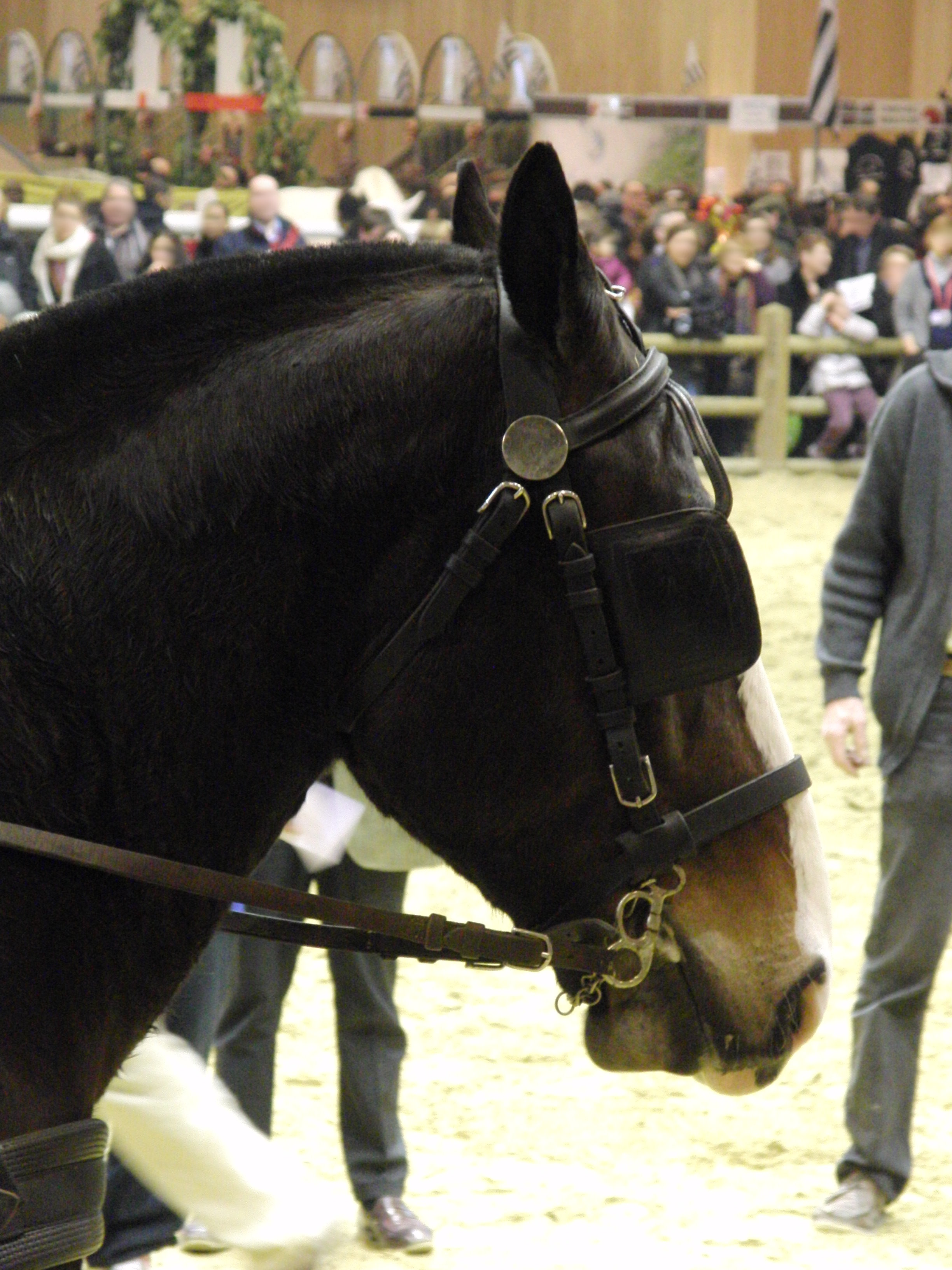 Tête d'un cob normand attelé lors du concours Trait d'avenir attelage dans l'épreuve de maniabilité - Salon international de l'agriculture 2013, Paris, France